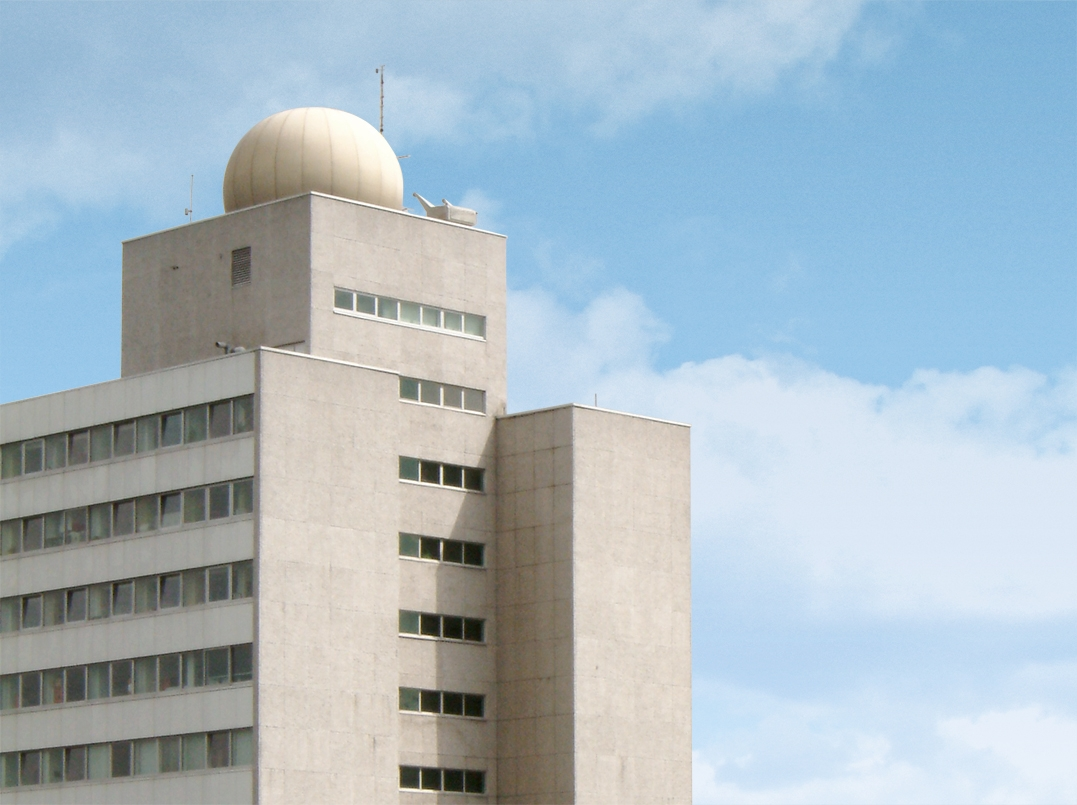 Hauptgebäude Fraunhofer HHI